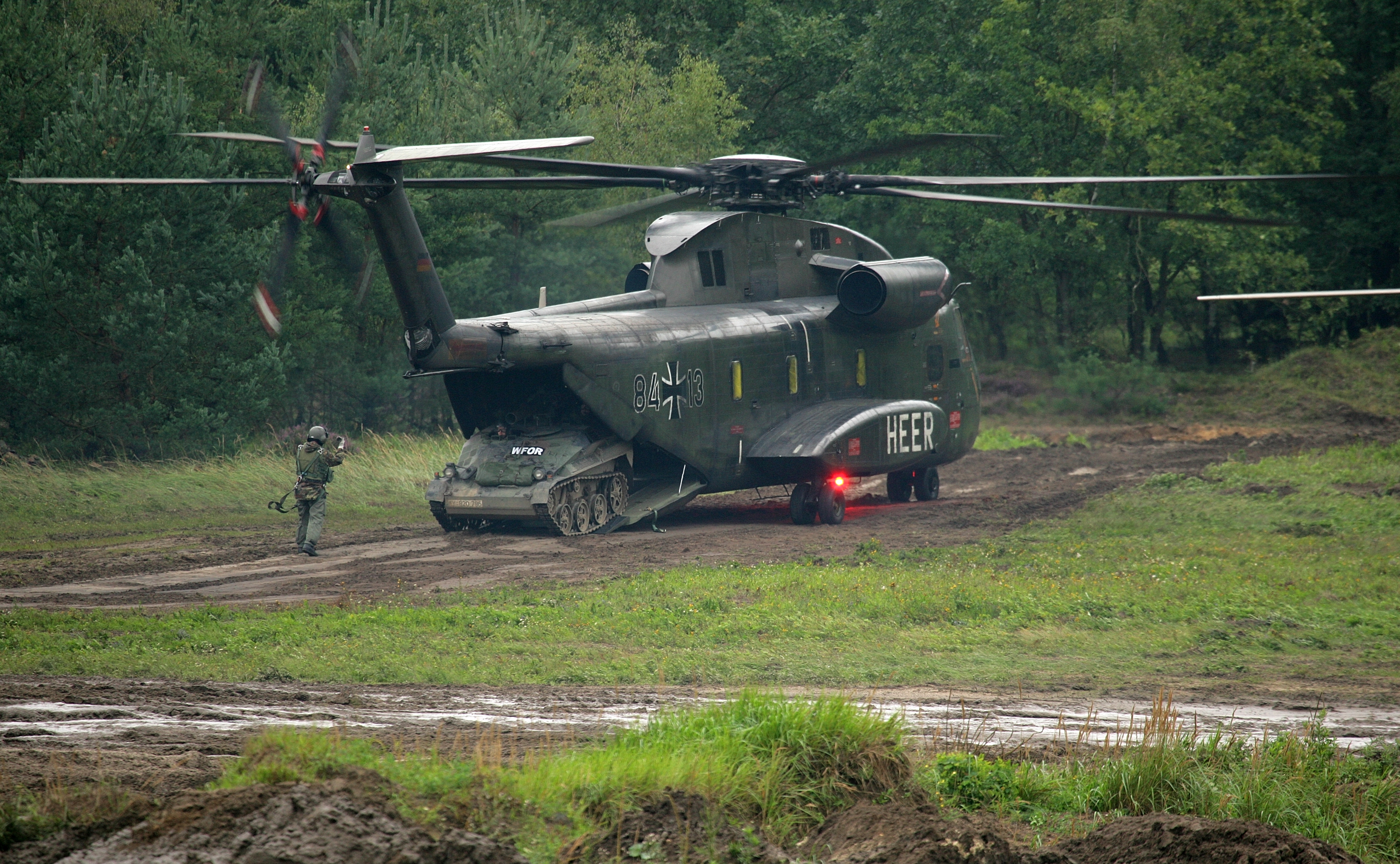 Absetzen eines Waffenträgers Wiesel durch den Mittlereren Transporthubschrauber CH - 53 G auf dem Truppenübungsplatz Munster. Der Transporthubschrauber CH-53G wird bei Personentransport, Materialtransport und für Sonderaufgaben eingesetzt..Vorüben der Informationslehrübung Heer. Die Panzerlehrbrigade 9 stellt vom 4. bis 10. September die Fähigkeiten des deutschen Heeres auf dem Truppenübungsplätzen Munster und Bergen vor. Unterstützt wird die Lehrbrigade dabei vom Ausbildungszentrum Munster. In diesem Jahr wird das heutige und zukünftige Aufgabenspektrum des deutschen Heeres in dieser Lehrübung dargestellt. Die Informationslehrübung richtet sich in erster Linie an den Führernachwuchs der Bundeswehr, der Offizierschule des Heeres und Soldaten ausländischer Streitkräfte.©Bundeswehr/Mandt